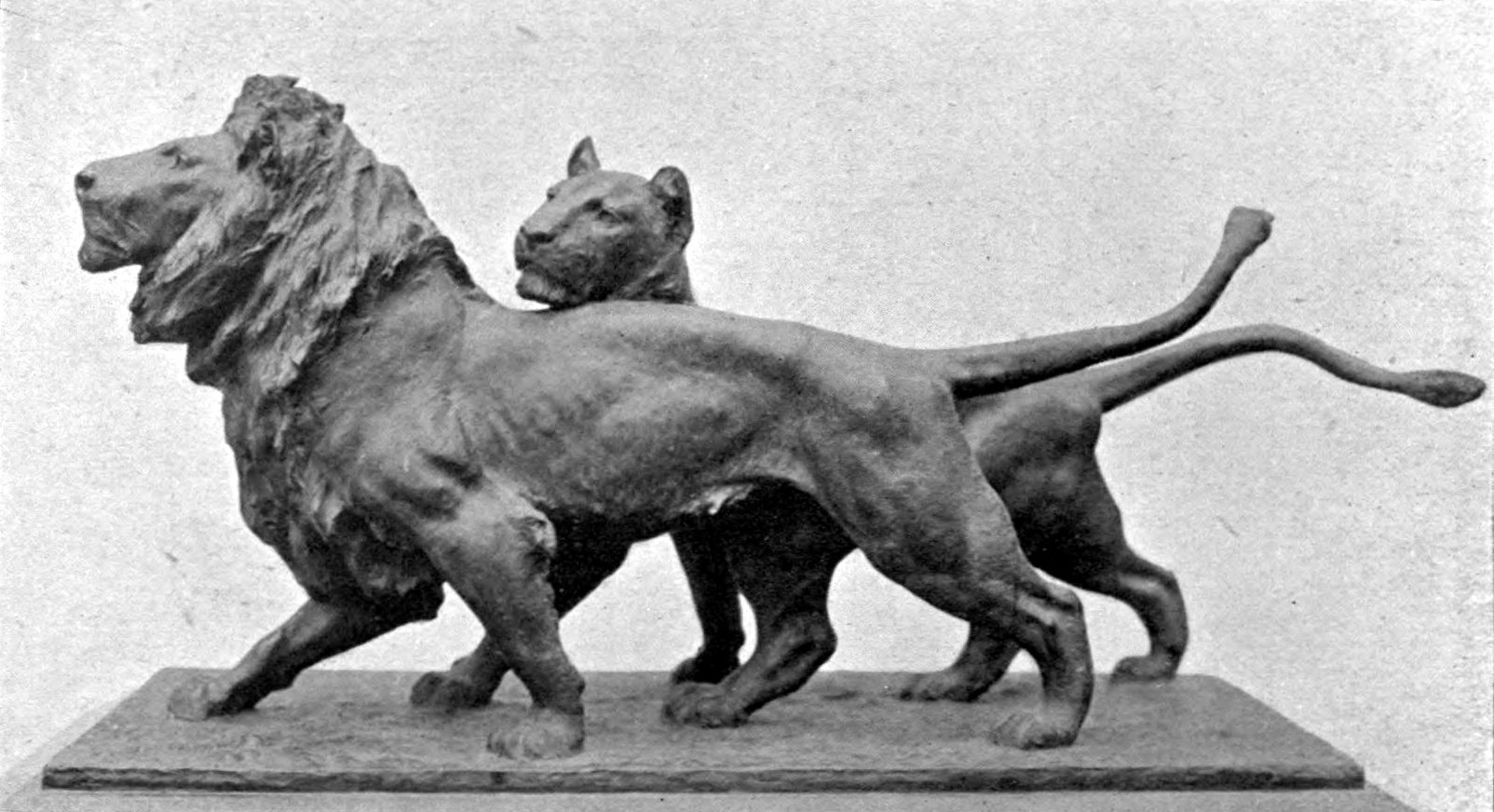 Lion et lionne